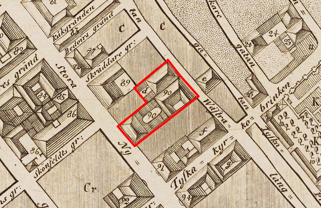 Kvarteret Cybele i Gamla stan. Litt 89: Dirktör Langes hus, litt 90: Kungl. Källarmästaren Langenbergs hus, litt d: Källaren Förgyllda vinfatet, litt 91: Actua Zettermans hus.